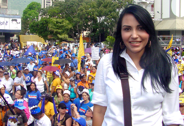 Foto de Delsa Solórzano en una manifestación pública.